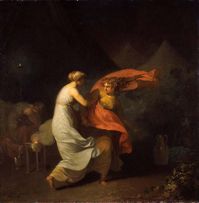 Nicolai Abildgaard: Julia og Fulvia, 1800. Olje på lerret. Mål: 47 x 46.5 cm. Ervervelse: Kjøpt i 2000